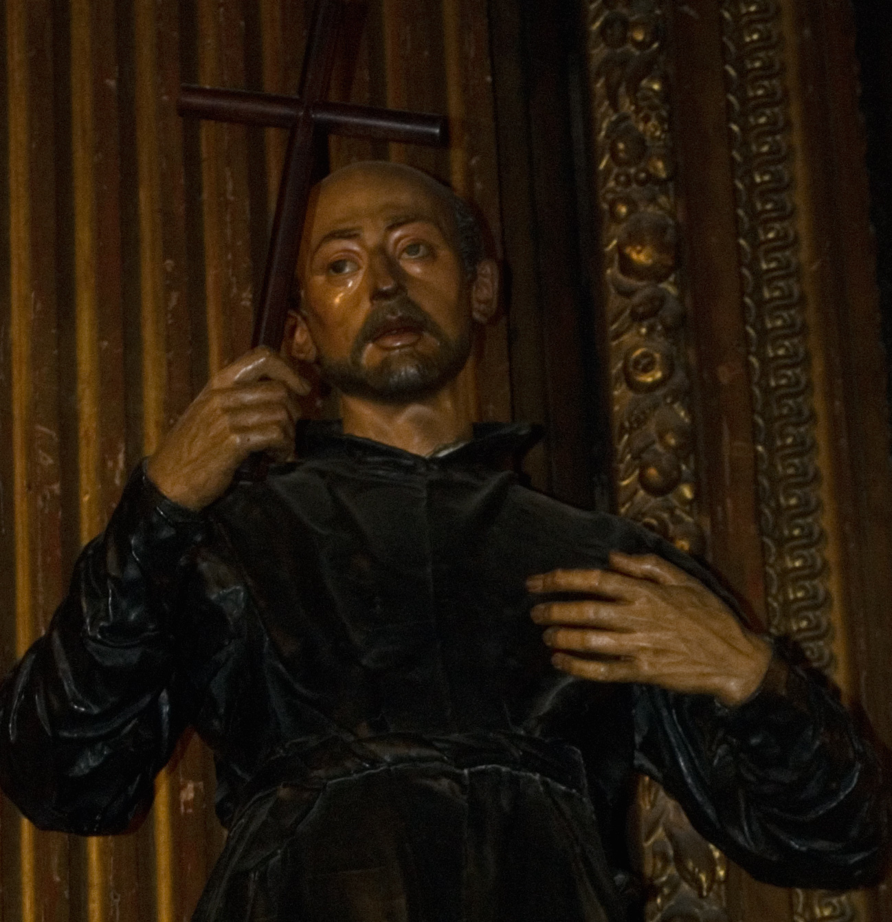 Detalle de la estatua de San Ignacio de Loyola (1610), autor Juan Martínez Montañés, iglesia de la Anunciación de Sevilla